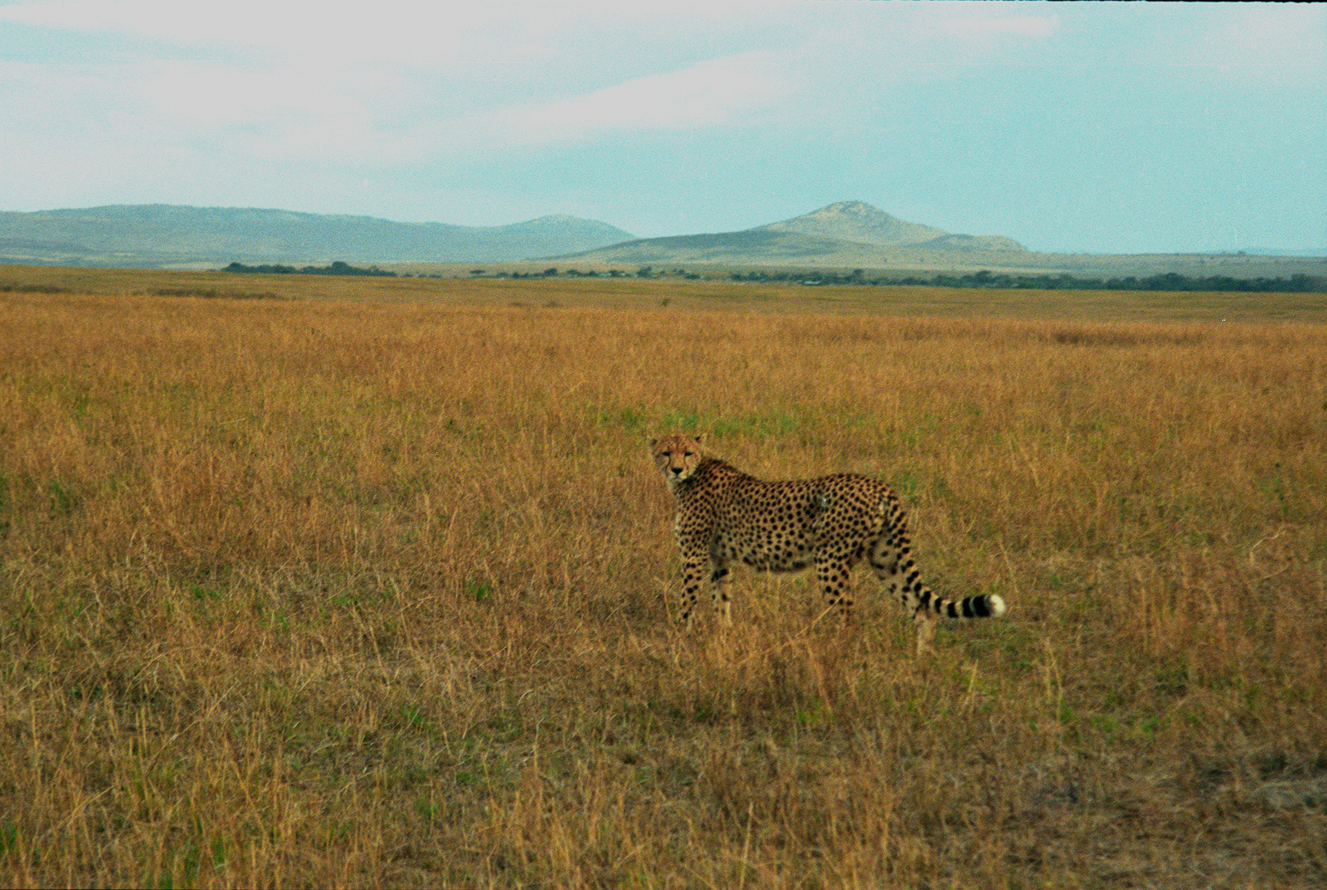 Cheetah, Masai Mara, Kenya